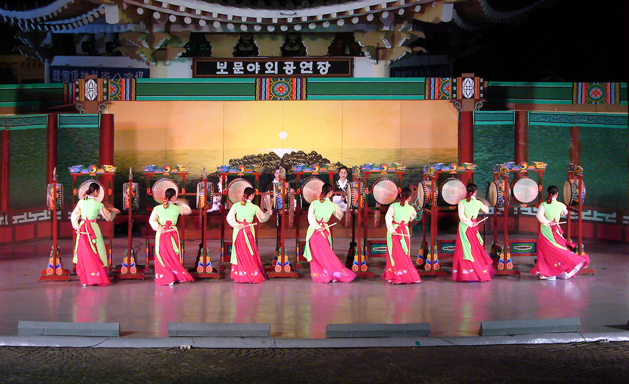 Bomun Lake traditional performance